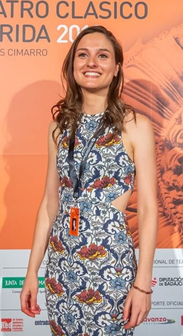 65º Festival de Teatro Clásico de Mérida. Fotógrafo: Diego J. Casillas